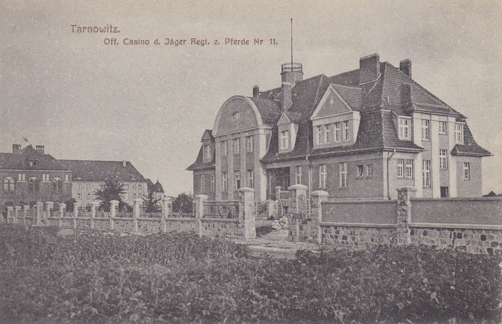 Kasyno dawnego 11 Pułku Strzelców Konnych Cesarstwa Niemieckiego. Pocztówka z ok. 1915 roku